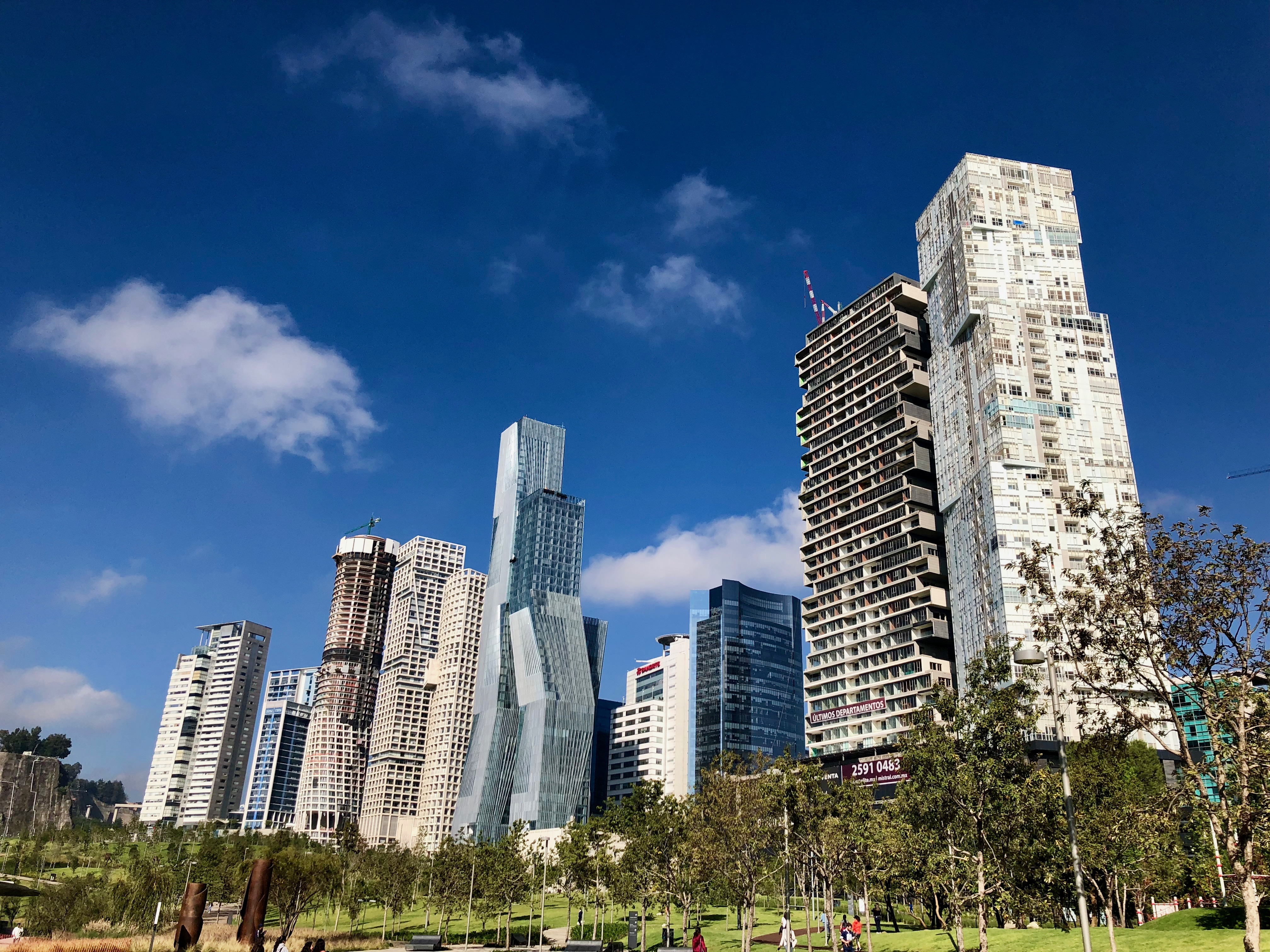 Edificios corporativos y residenciales con vista a La Mexicana.